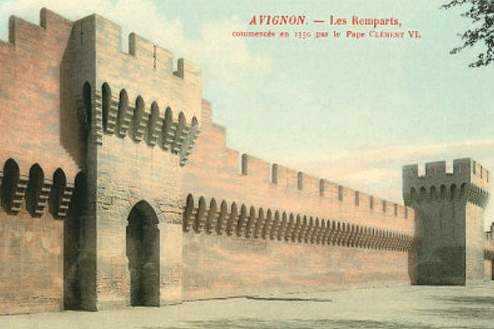 Les remparts d'Avignon, carte postale colorisée du début du XXe siècle